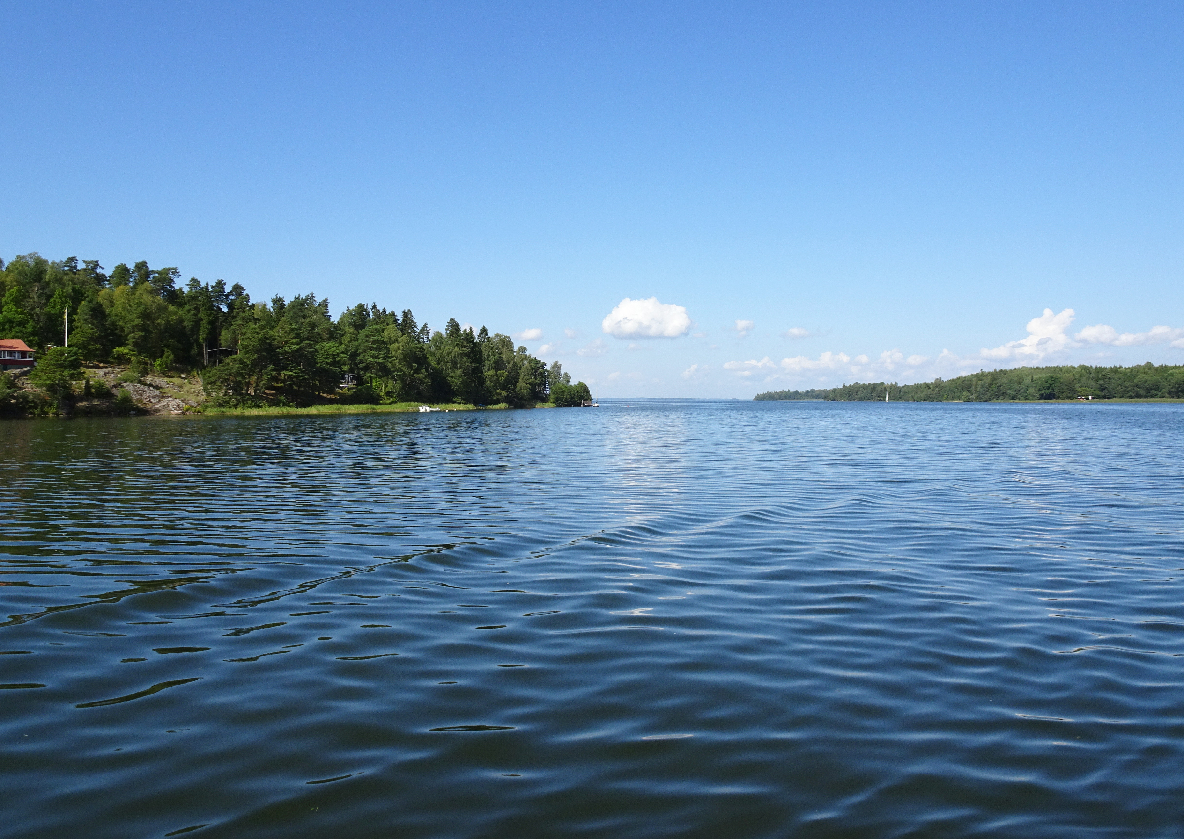 Svinsundet mot norr, sett från Adelsöleden